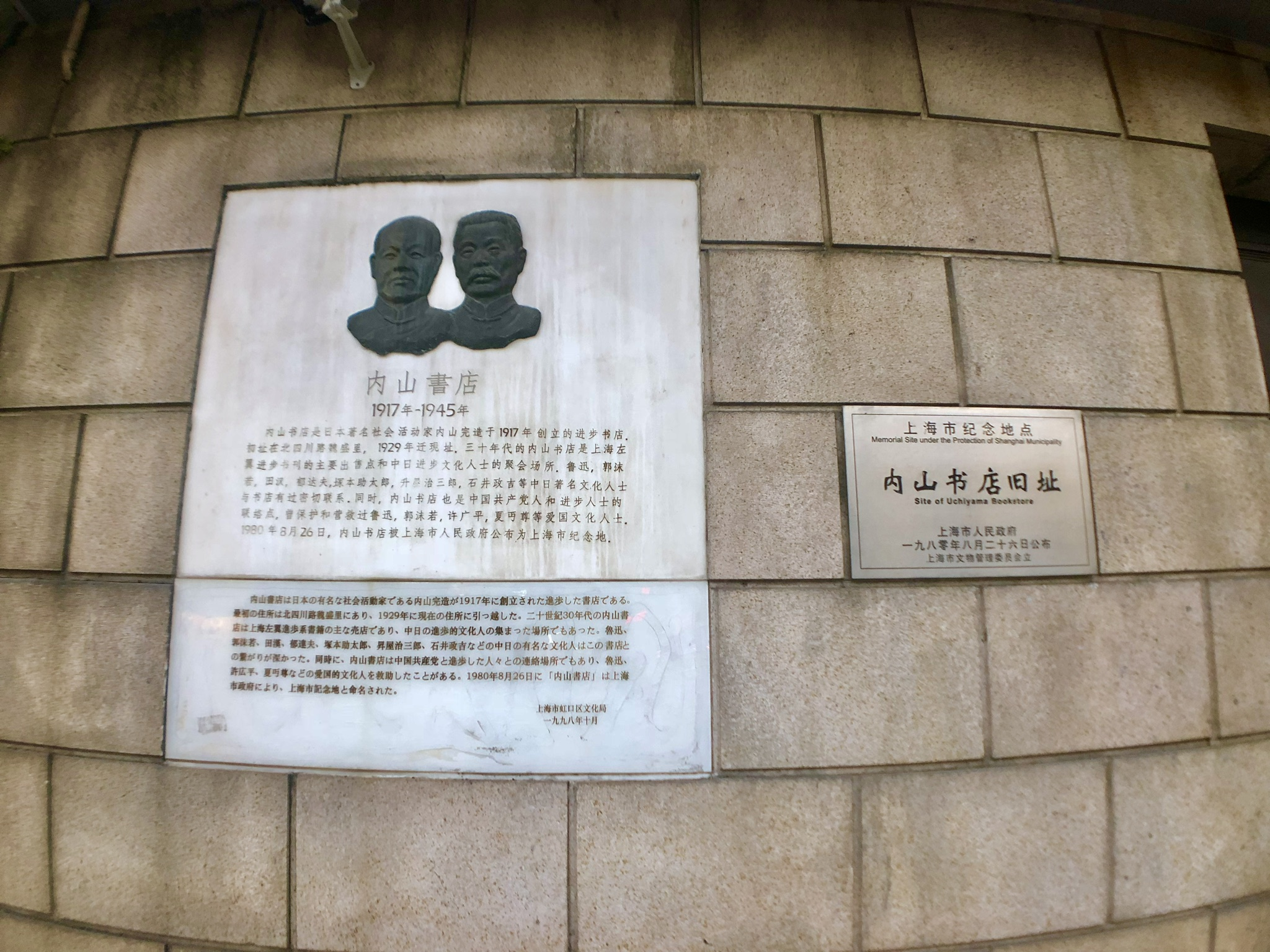 上海内山書店舊址標示牌